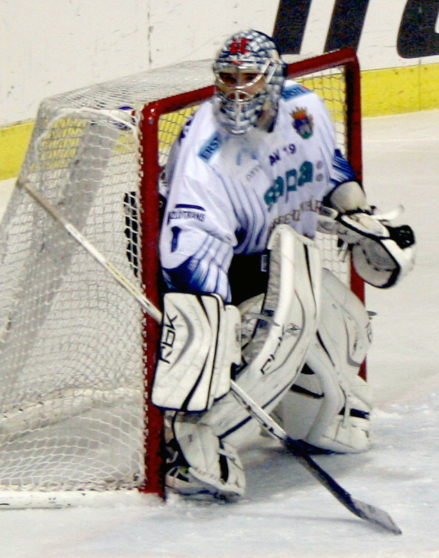 Zoltán Hetényi